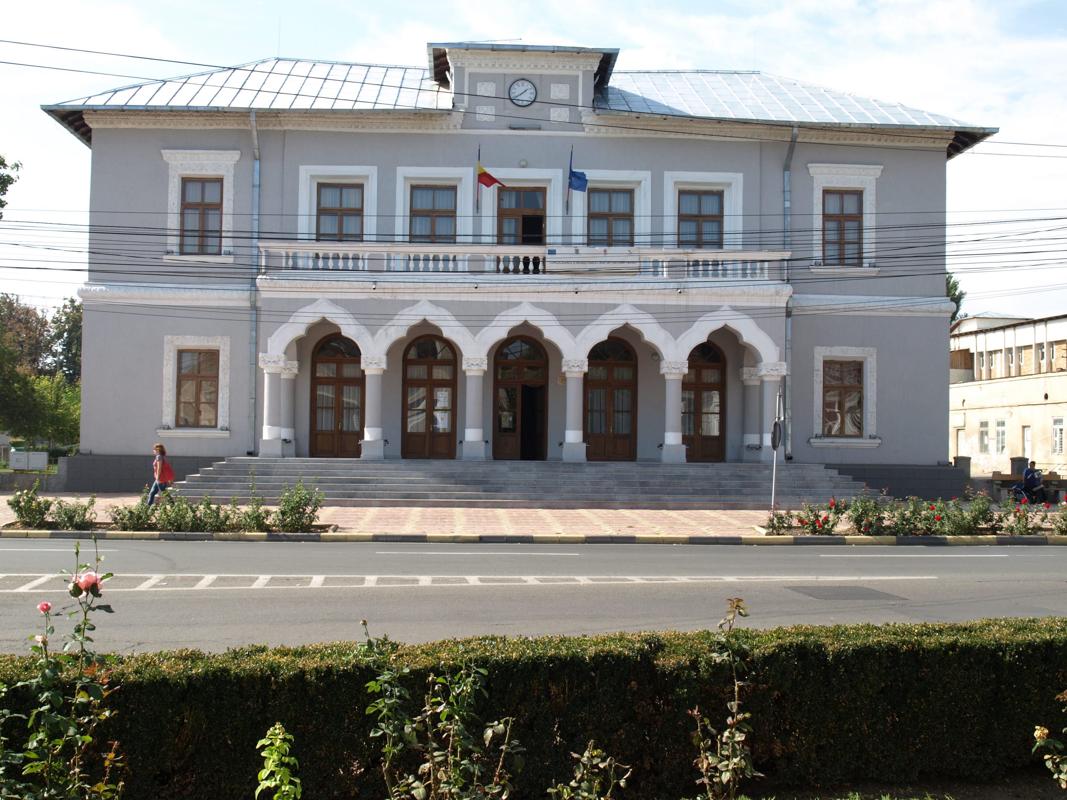 Clădirea Primăriei Vechi, azi Casa de Cultură